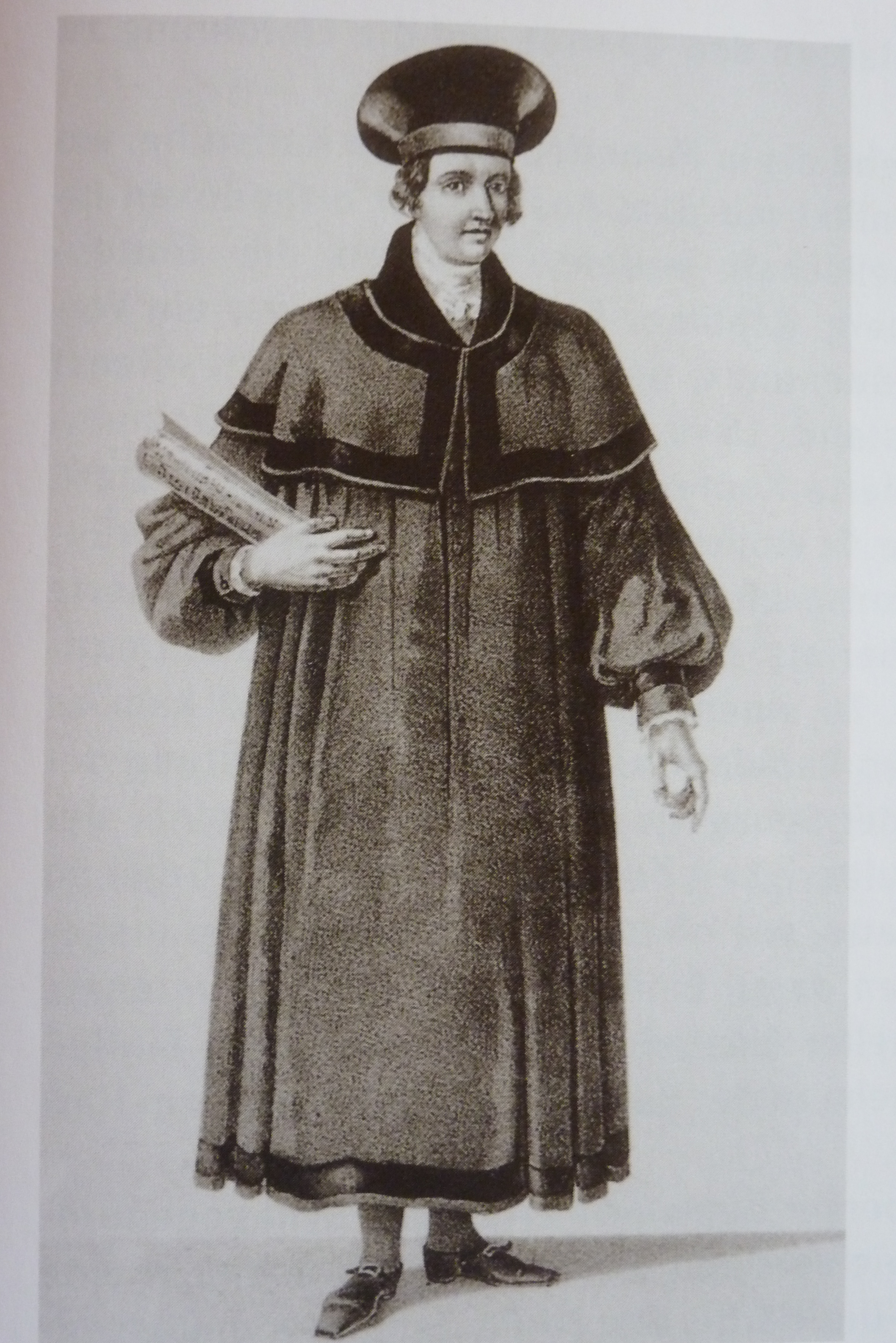 Amtstracht der Vorsänger (Chasan (Kantor) in Baden (Land), um 1843